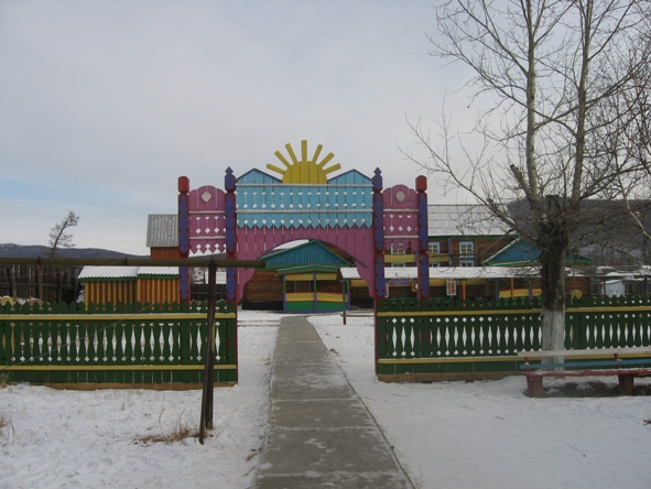 Детский дом в улусе (селе) Баянгол, Закаменский район Бурятии